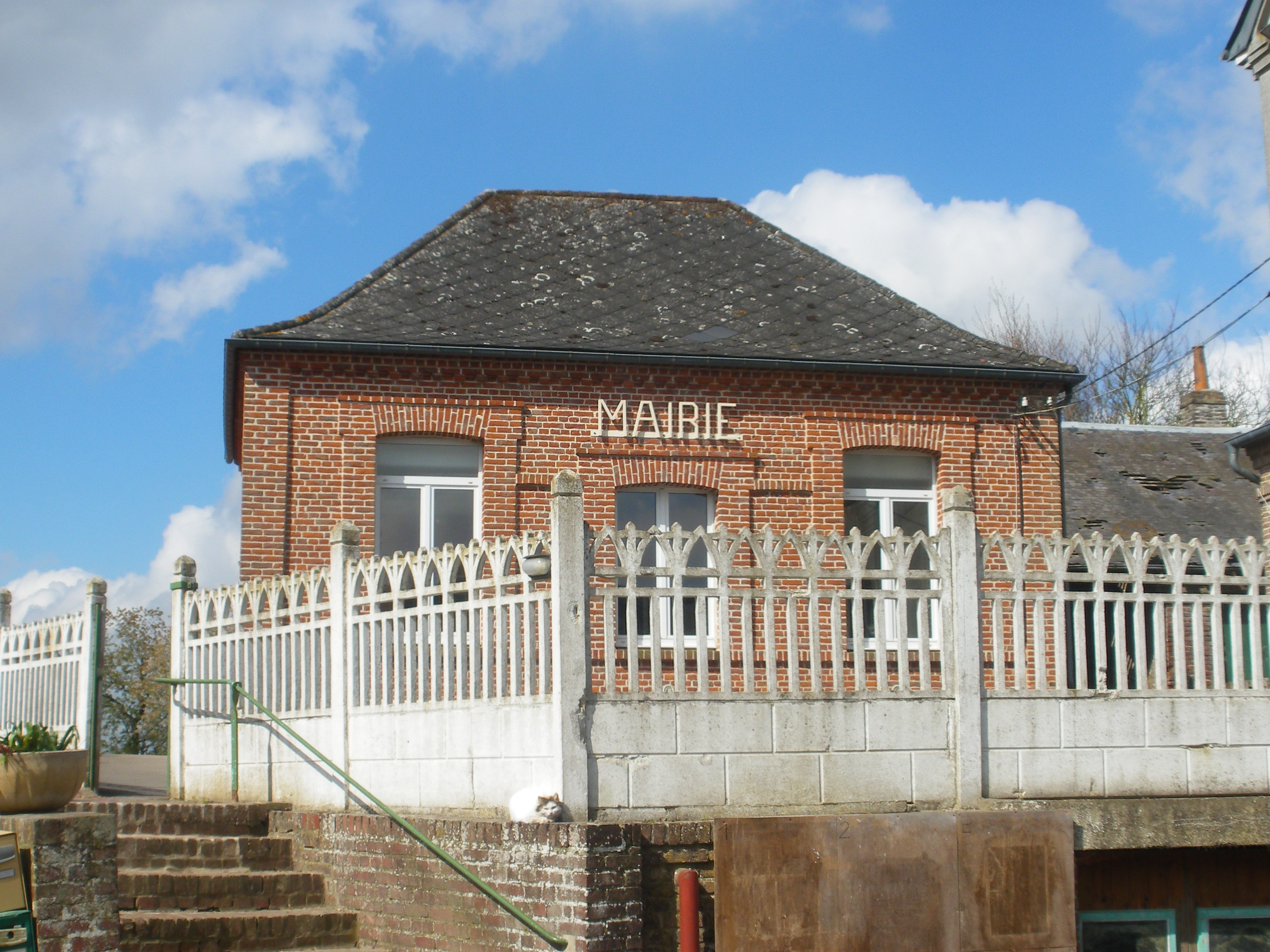 Vue de la mairie de Le Souich.